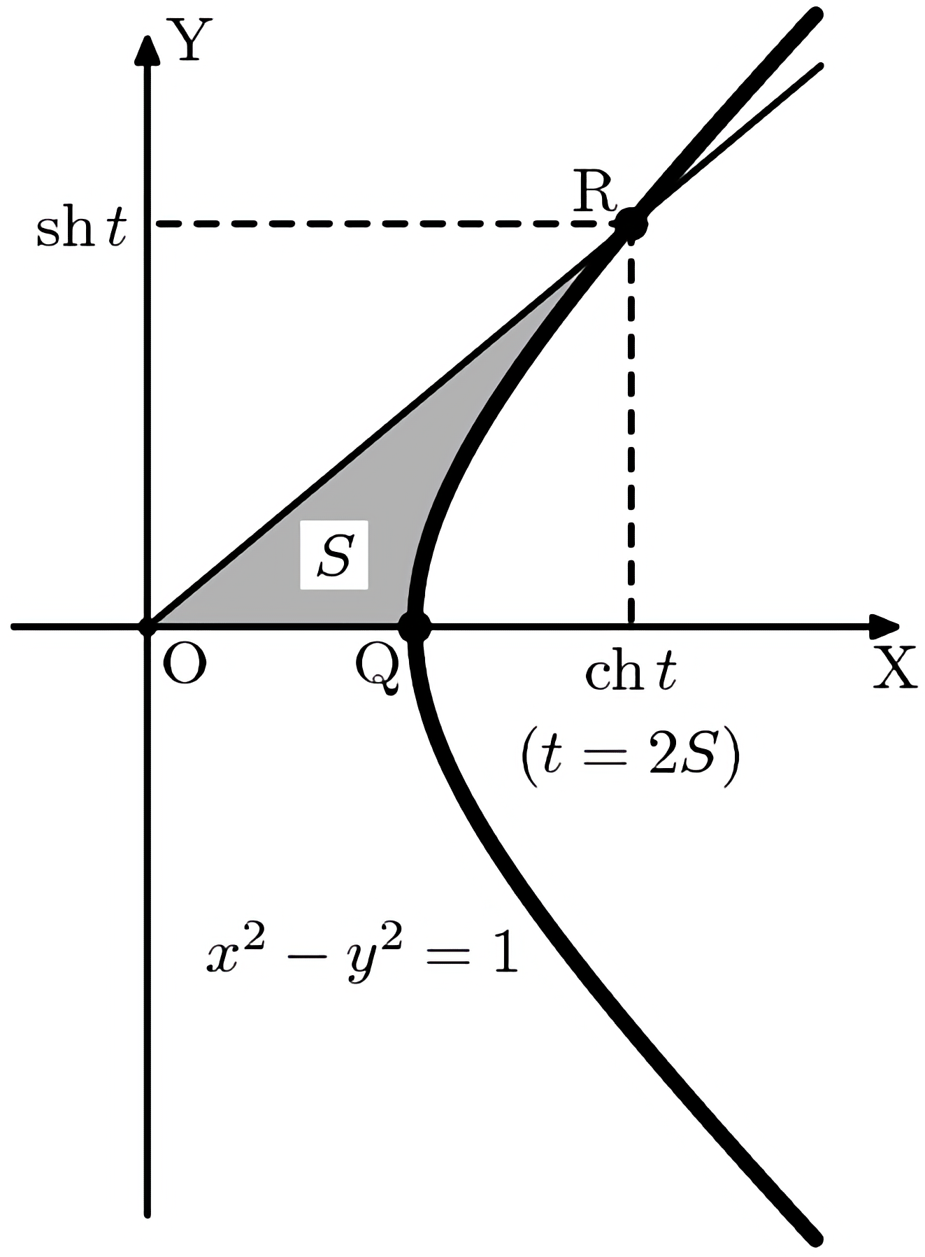 Hyperbole et fonctions hyperboliques ch et sh